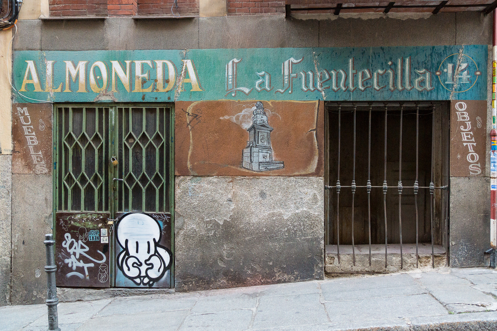 Almoneda - La Fuentecilla, calle del Carnero nº14, Madrid, España.